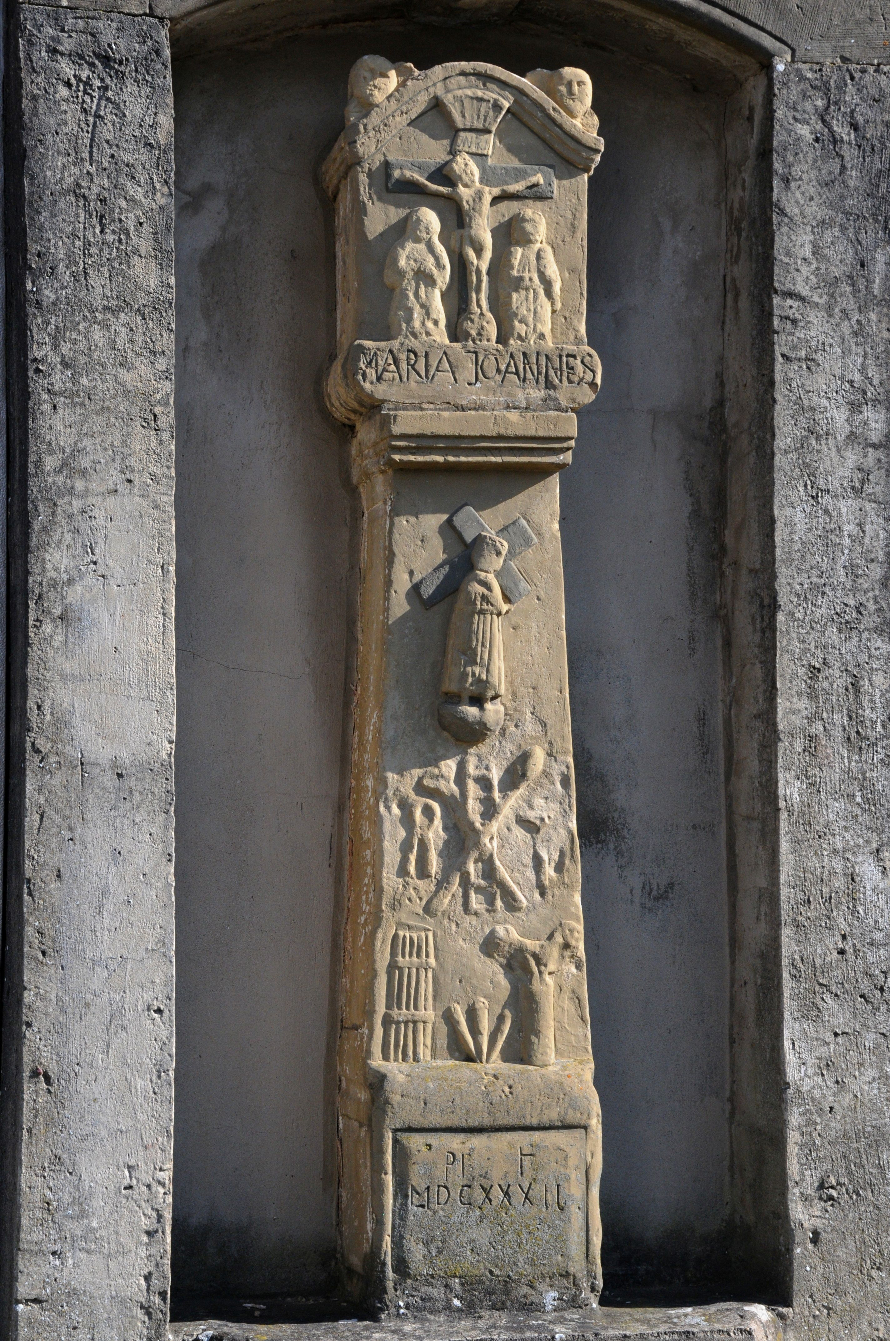 Pestkreuz (BIldstock) in Temmels. 1957 in schützender Portalrahmung an die Giebelwand gesetztes Schaftkreuz. Der 1632 datierte Kreuzbildstock ist erheblich jünger und gehört zu dem nach 1800 an Saar und Obermosel beliebten Typ des mit den Leidenswerkzeugen geschmückten Schaftes, der hier als Besonderheit zusätzlich den kreuztragenden Christus zeigt.